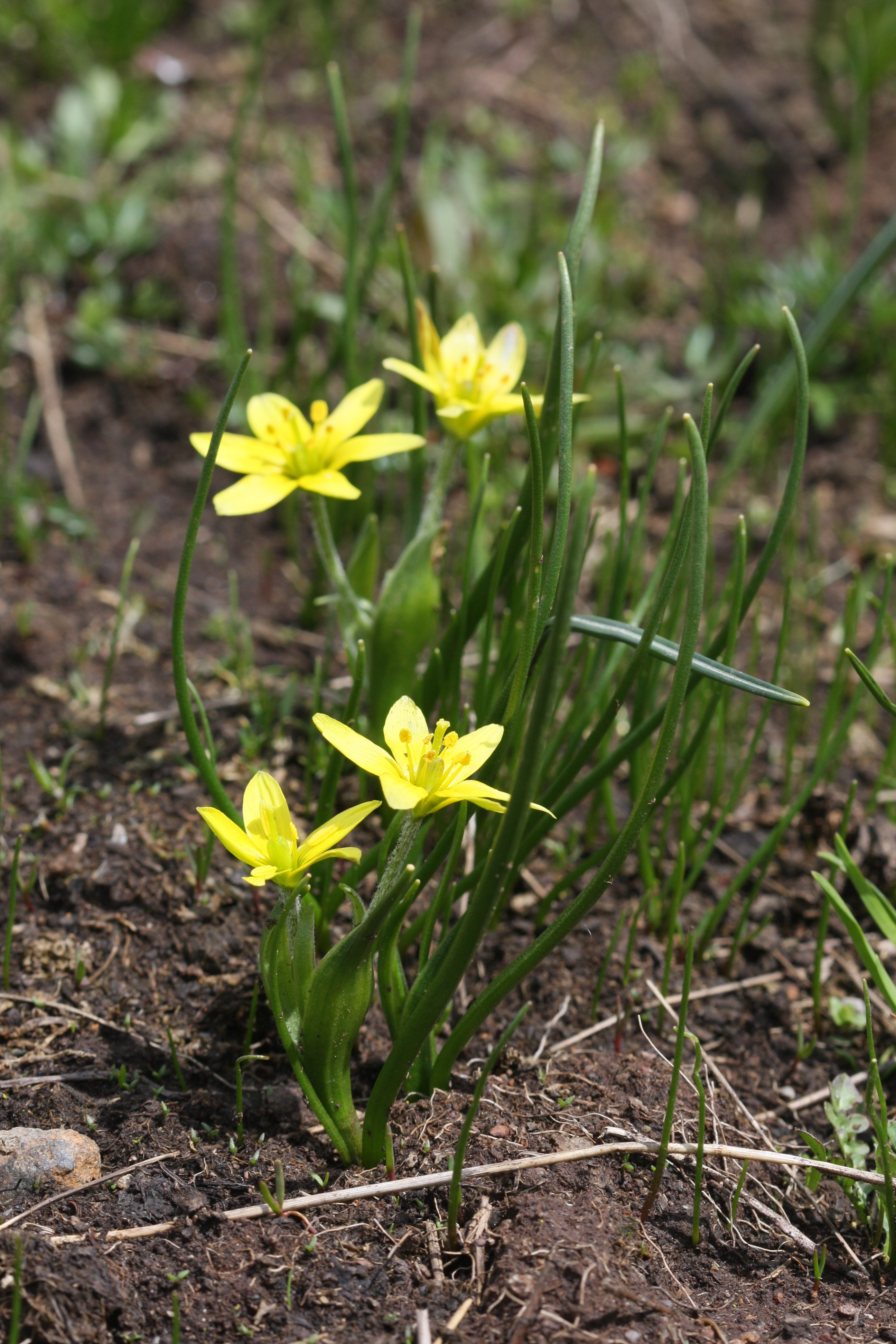 Gagea fragifera, Lacs d'Ayous, France